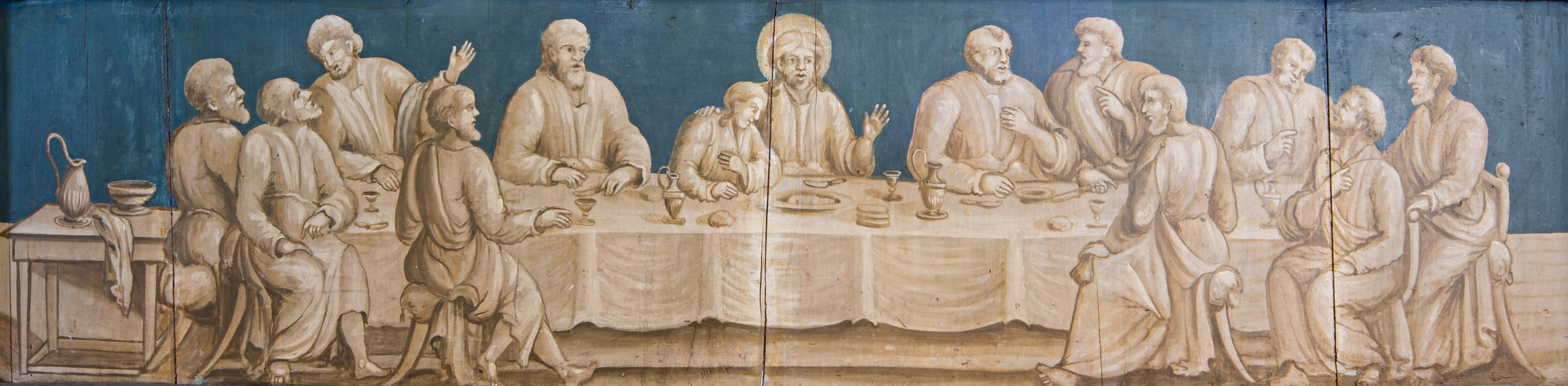 Målning på altarringen i Sankt Anna kyrka i Linköpings stift av Svenska kyrkan. Målad av målaråldermannen Bengt Frökenberg, 1776-1845.